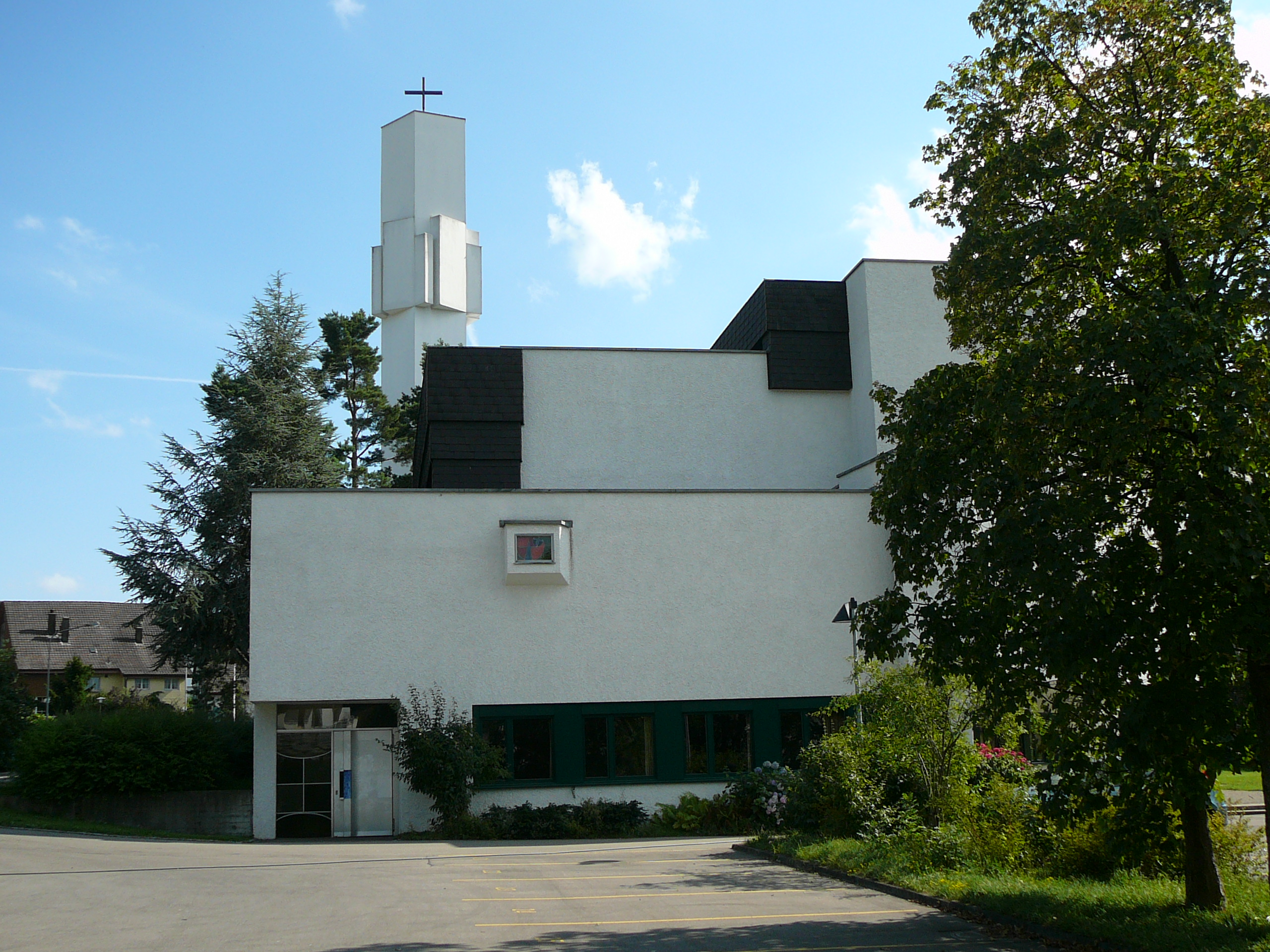 Römisch-katholische Pfarrkirche St. Michael Zollikerberg, Ansicht von Nordosten